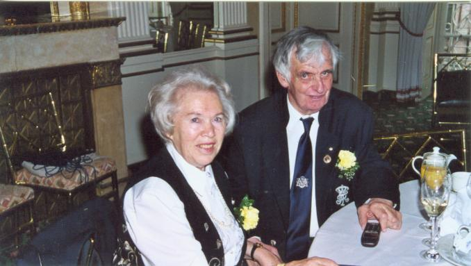 S.K.H. Dr.phil. Albert Prinz von Sachsen Herzog zu Sachsen und Gattin Elmra (in 2005)